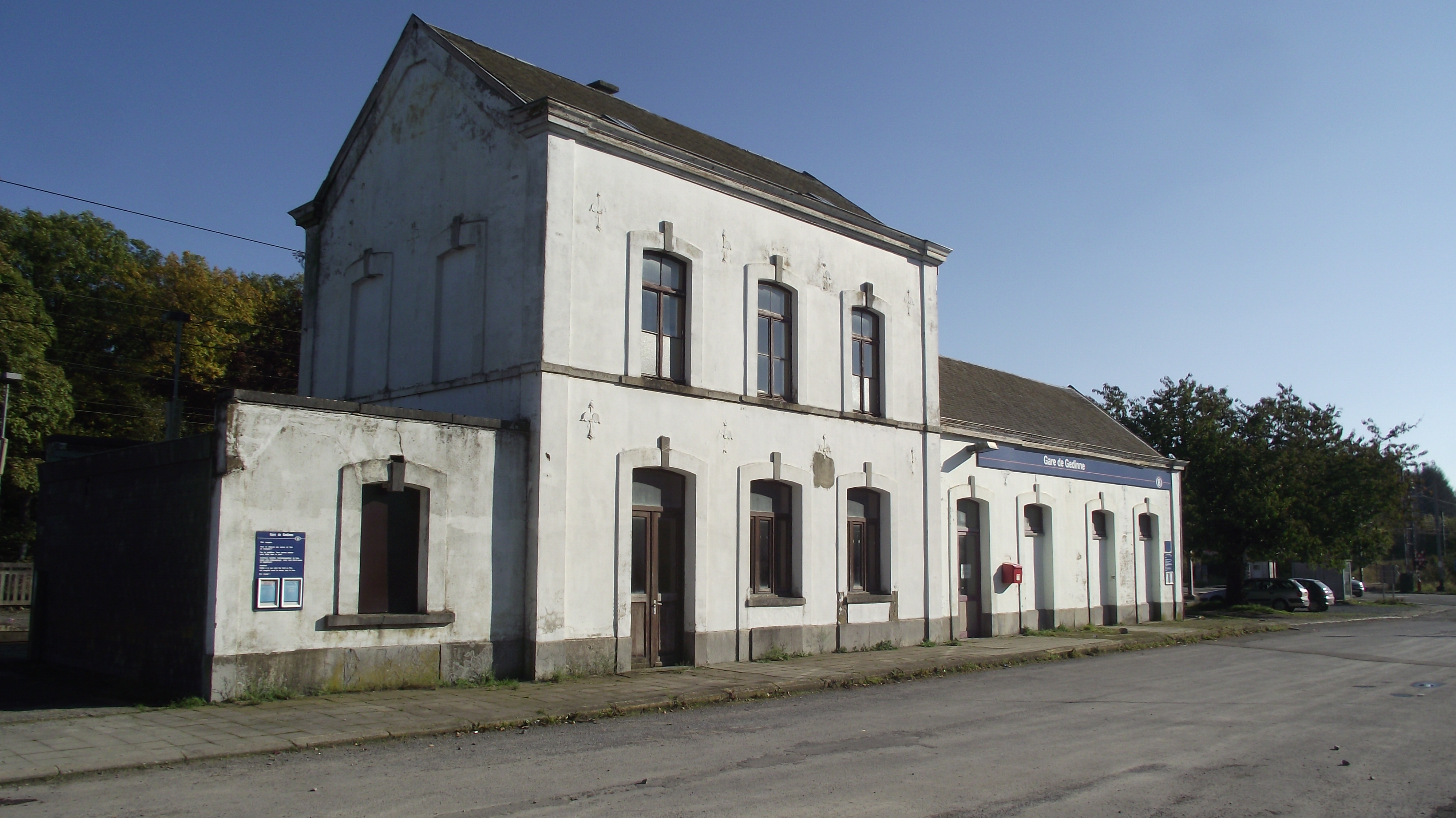 Voorkant van station Gedinne